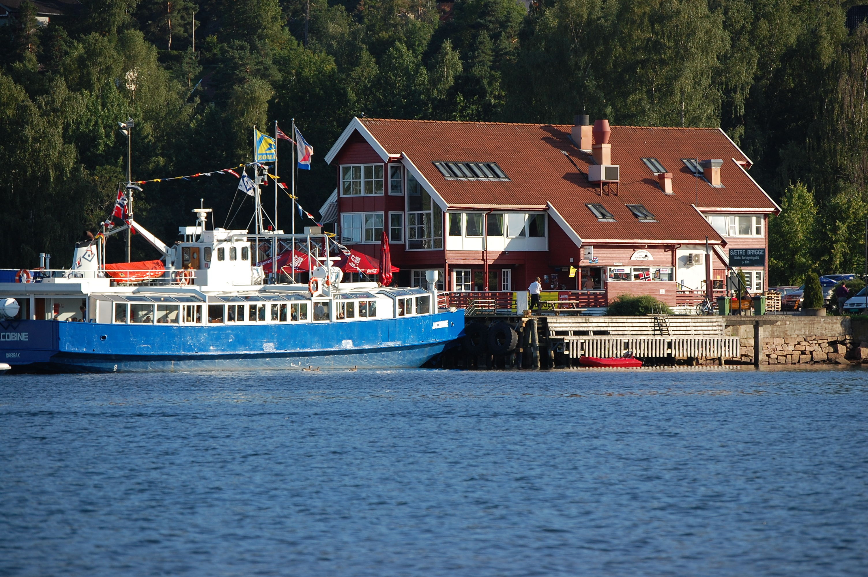 Sætre Marina